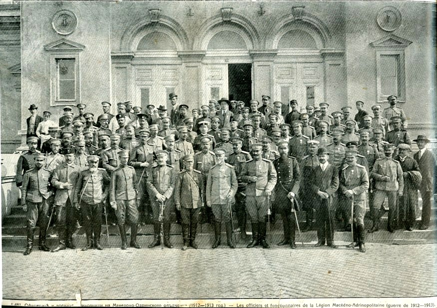 Офицерите и военните чиновници на Македоно-одринското опълчение в 1912—1913 година